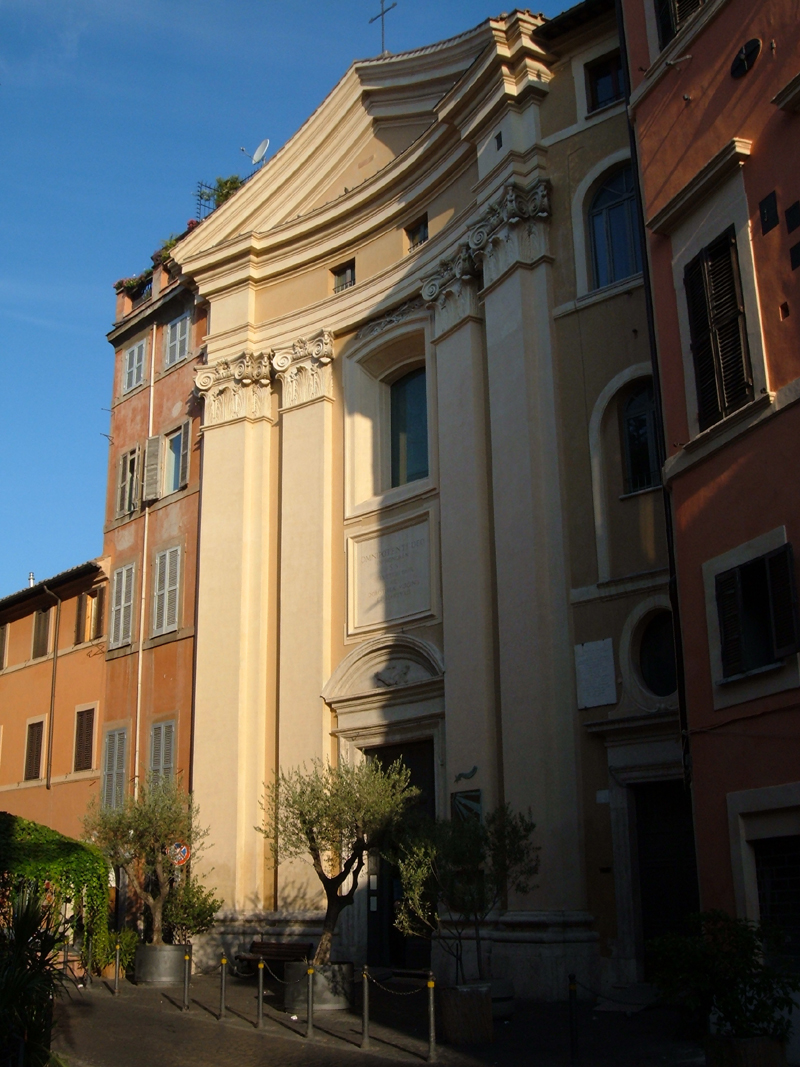 Eglise de Sainte Dorotée, à Rome, dans le "rione Trastevere".